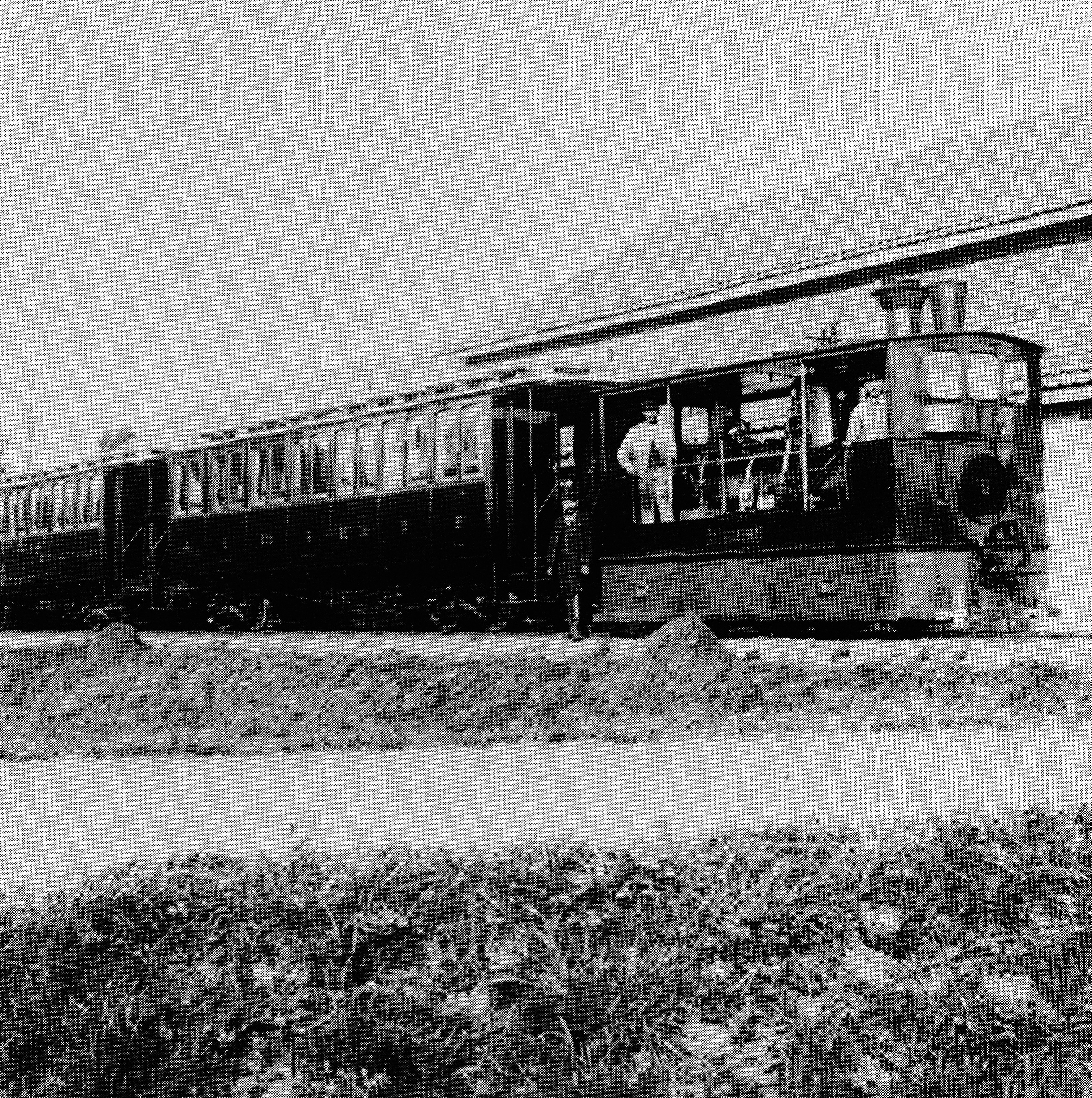 Zug der Birſigthalbahn, gezogen von der Dampflocomotive Nr. 5 Blochmont des Typs G 3/3, gebaut 1896 inn der Schweizeriſchen Locomotiv- und Machines-Fabrique zů Winterthur (Fabr.-Nr. 976), 1911 außer Dienſt geſtellt und anſchließend abgebrochen.